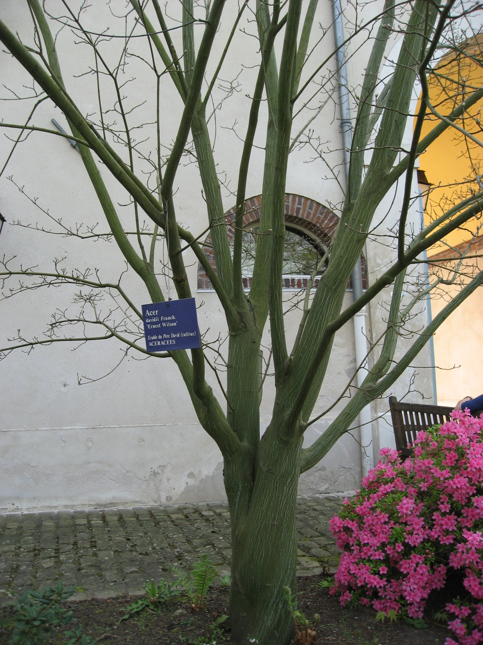 Acer davidii 'Ernest Wilson' Franch. (Erable du Père David (cultivar)) in Arboretum de la Vallée-aux-Loups Map: 48° 46' 22" N 2° 16' 5" E